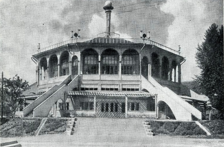 Старое здание Южного речного вокзала со стороны набережной.